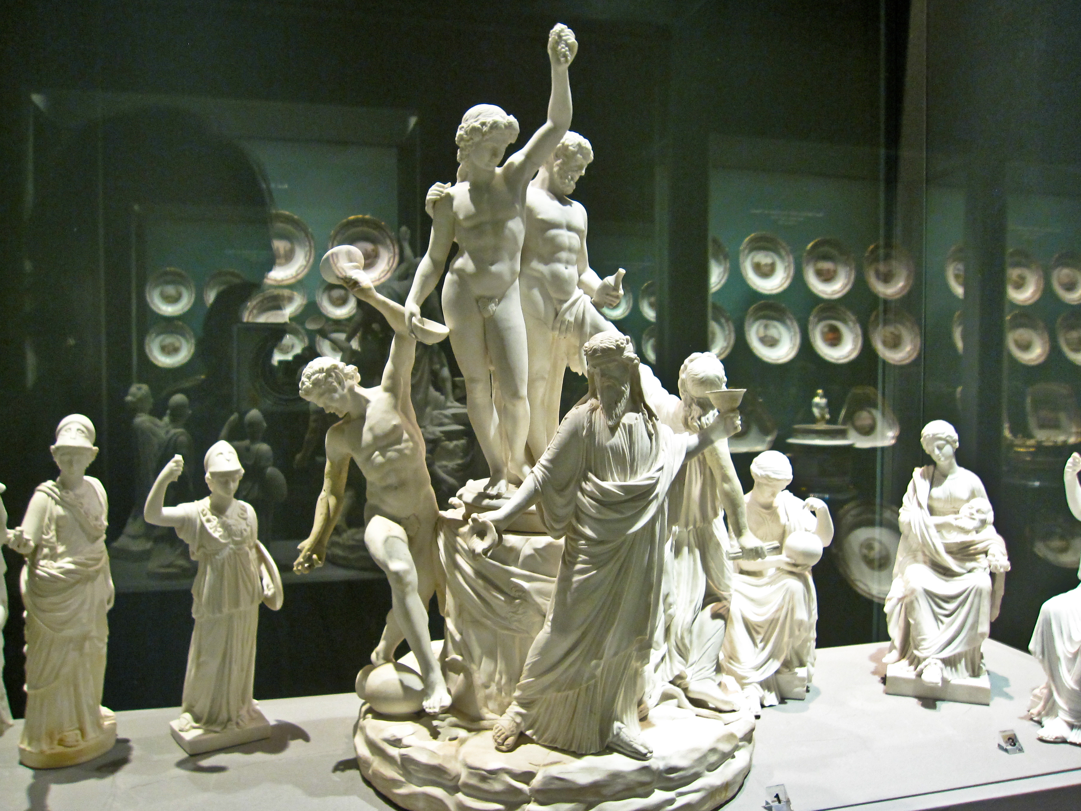 Filippo Tagliolini - "Trionfo di Bacco" - Museo di Capodimonte (Napoli), Appartamento Reale, Galleria delle porcellane, acquisizione dei Borboni (inv. OA 5300).